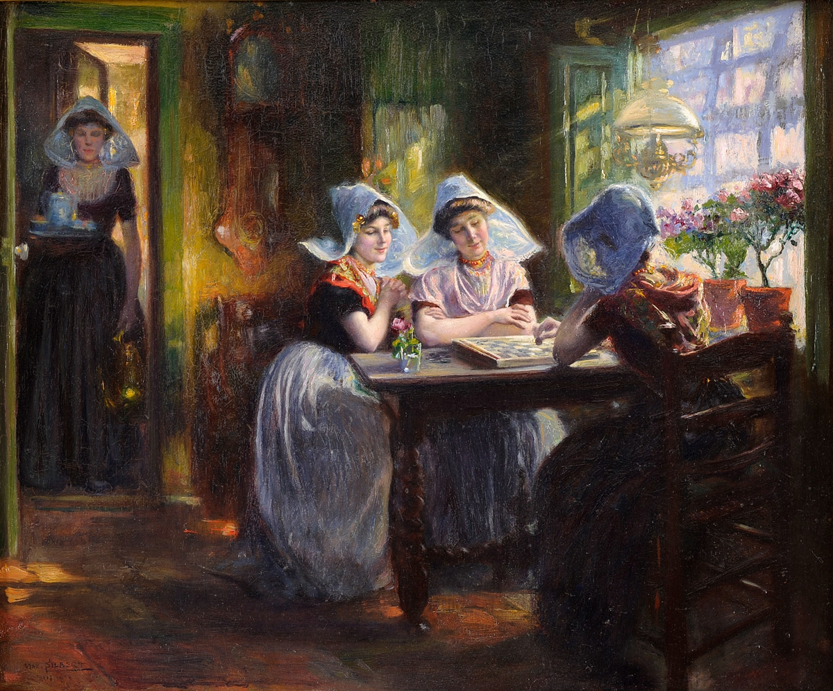 Das Damespiel (lt. Auktionshaus Die Partie Mühle bzw. La partie d´echecs, das Bild zeigt aber ein Damespiel). Signiert. Öl auf Leinwand, 46 x 55 cm